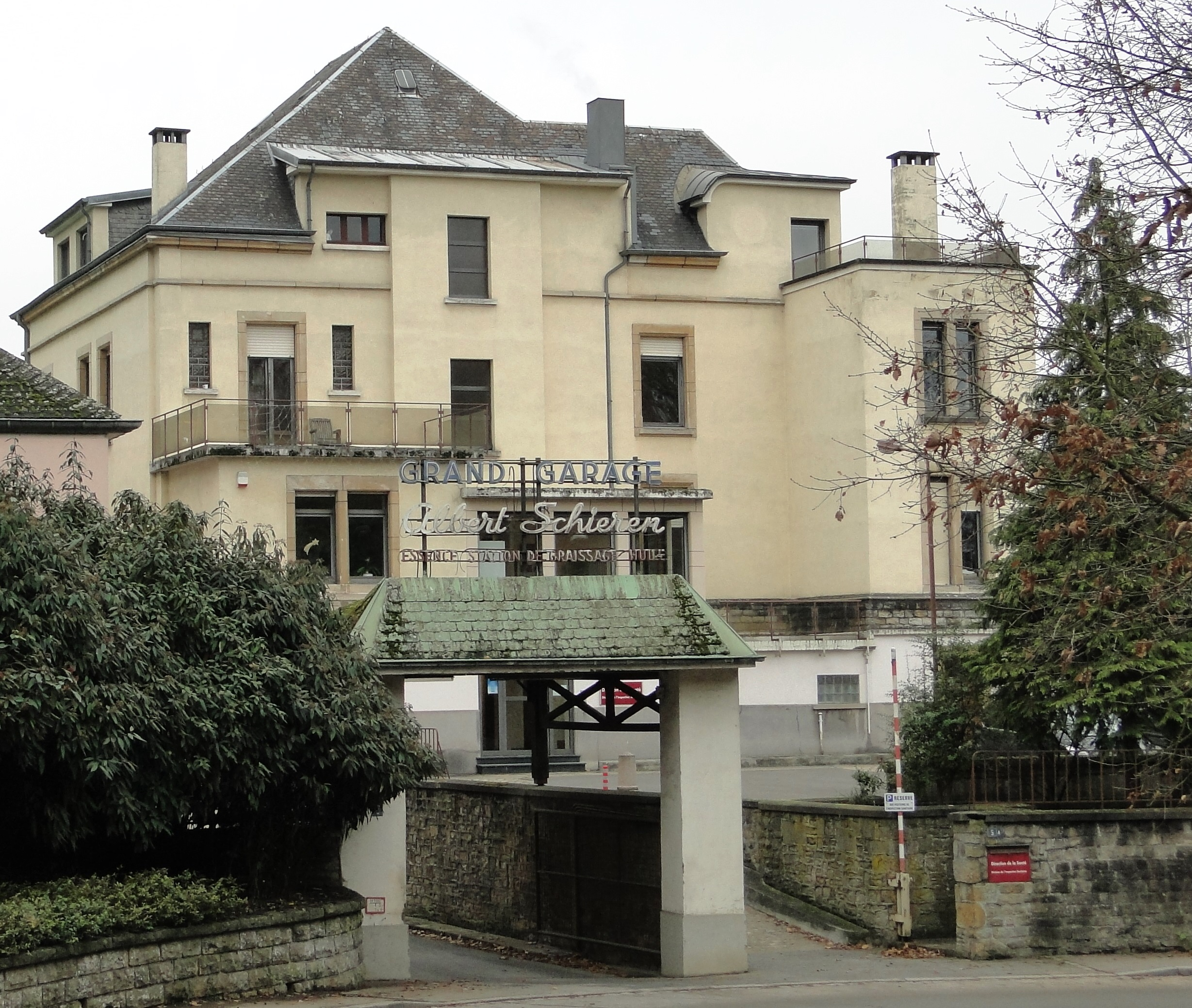 Villa Elisabeth am Standort des ehemaligen Pulvermagazins des Fort Elisabeth.